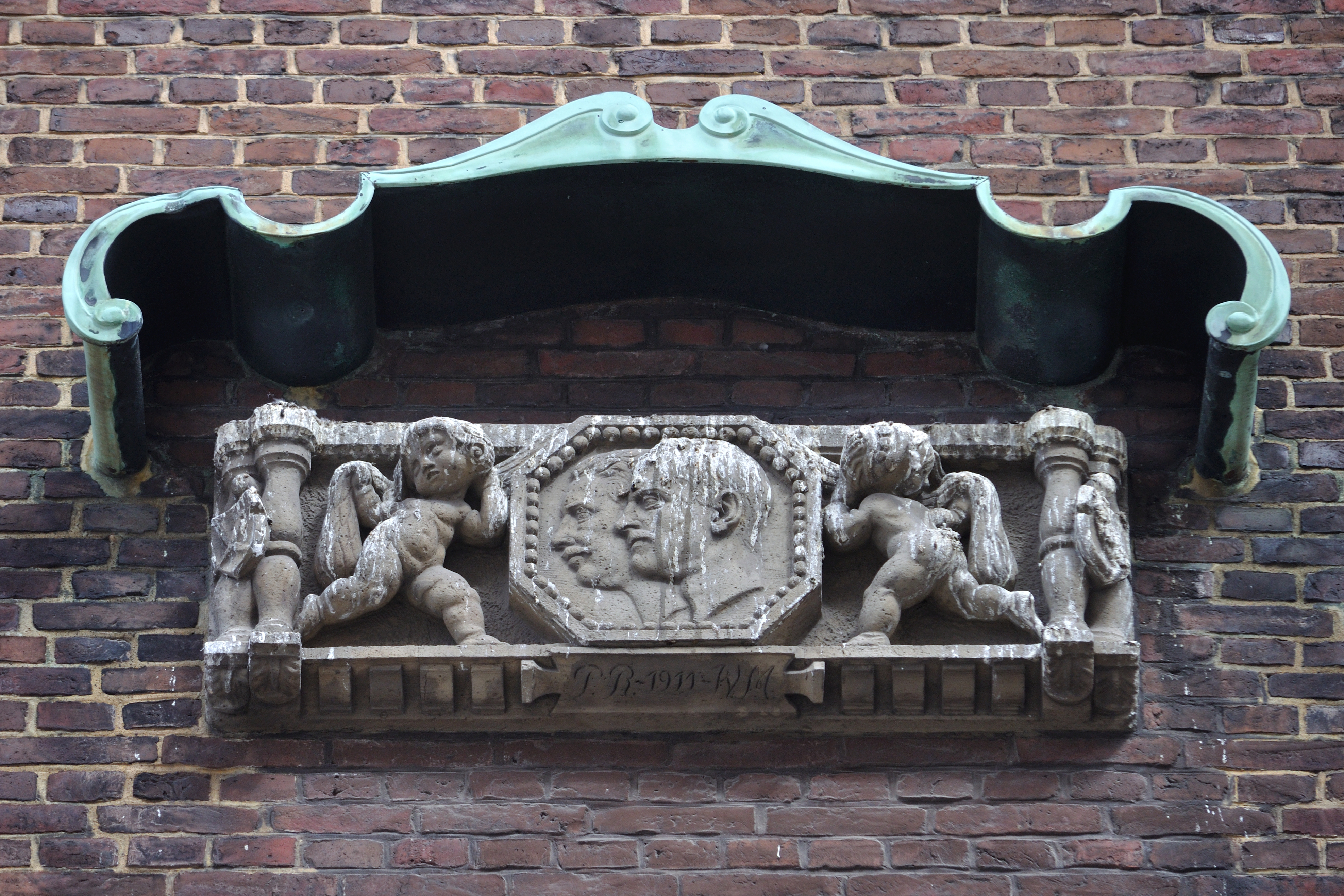 Fassadendetail am Haus Dammtorstraße 27 in Hamburg-Neustadt. This is a photograph of an architectural monument.